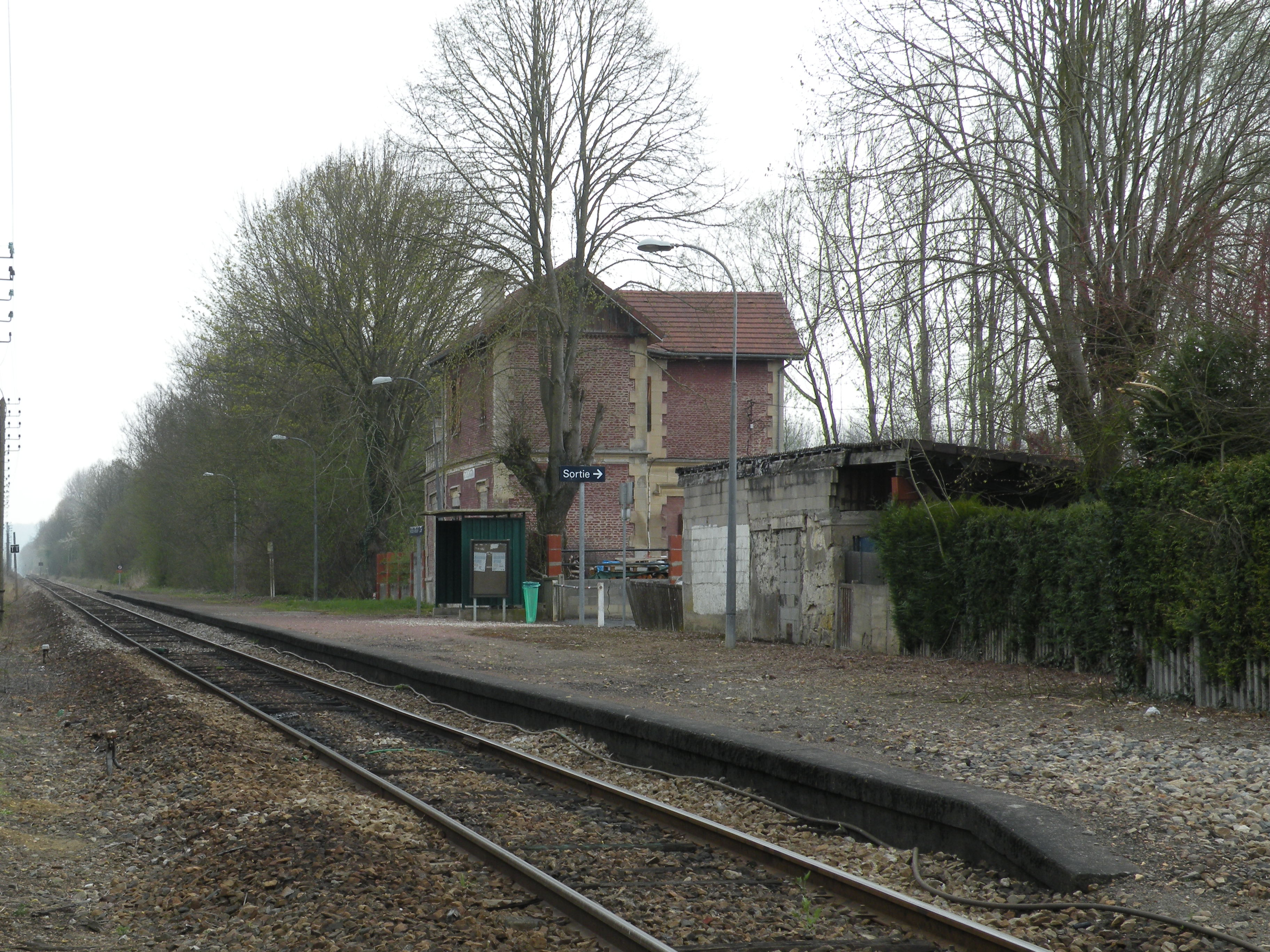 Quai de la gare de Heilles